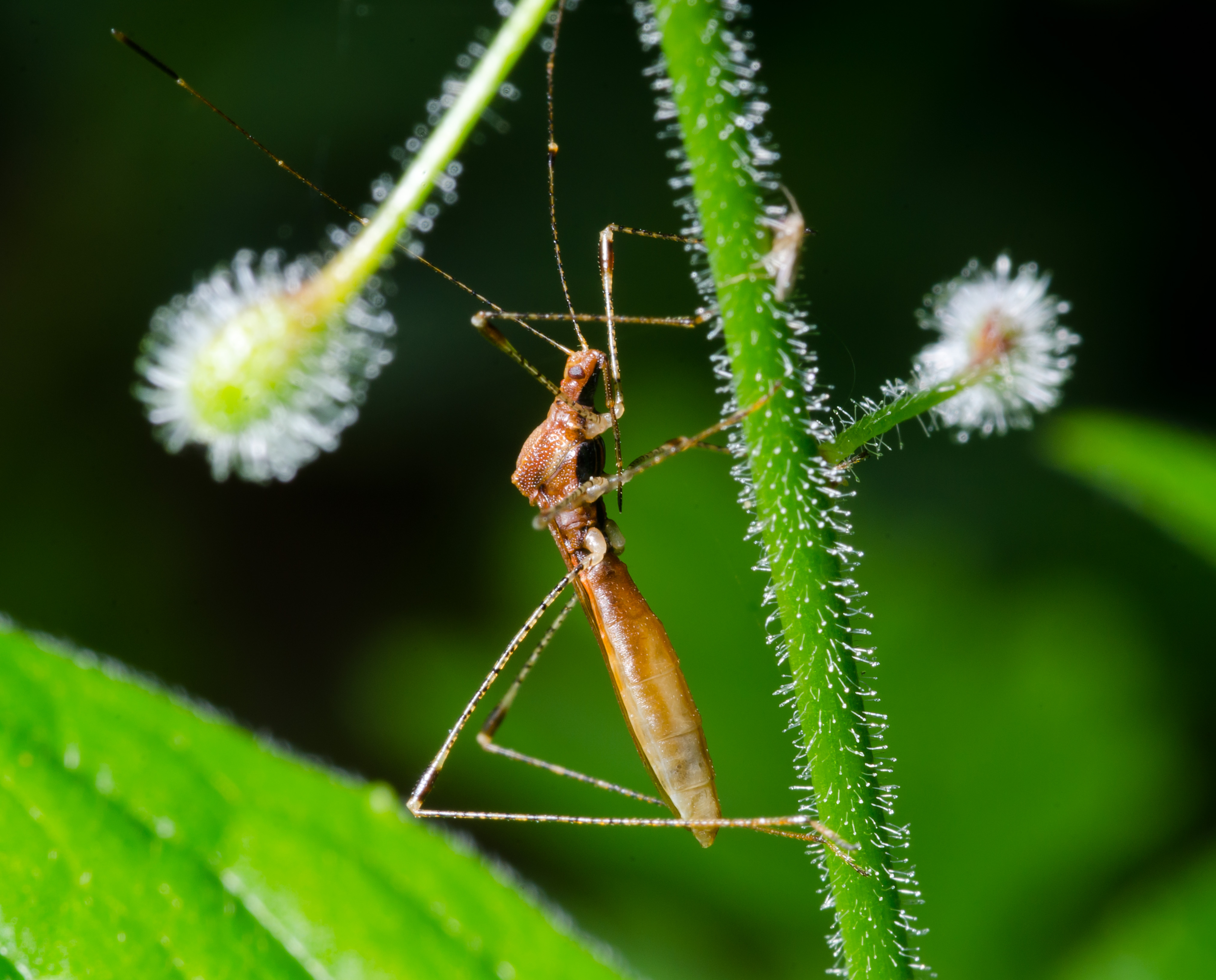 Stelzenwanze (Metatropis rufescens). Wald bei Stuttgart